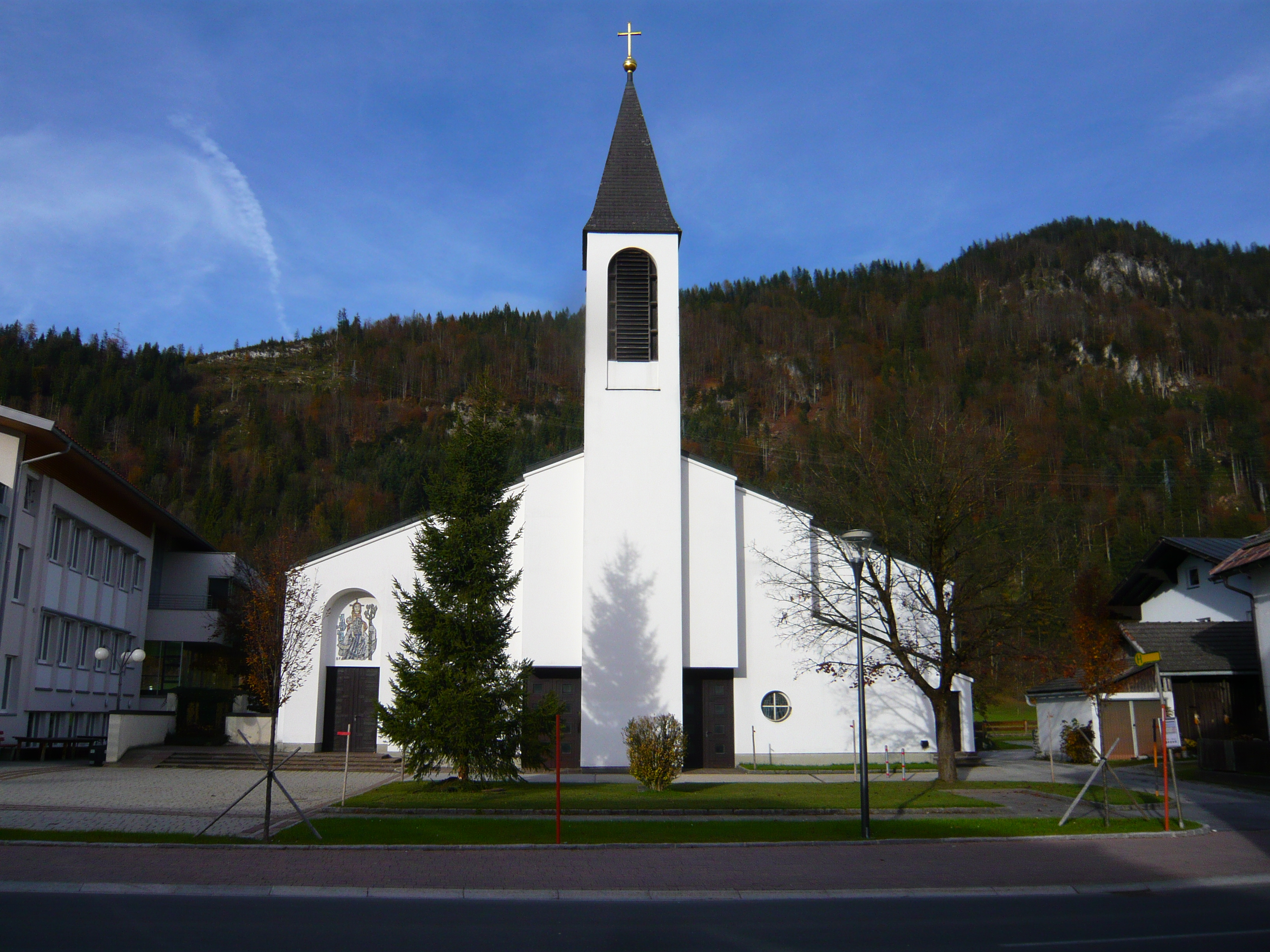 Kath. Pfarrkirche hll. Petrus und Paulus - Lofererstraße, Kirchbichl